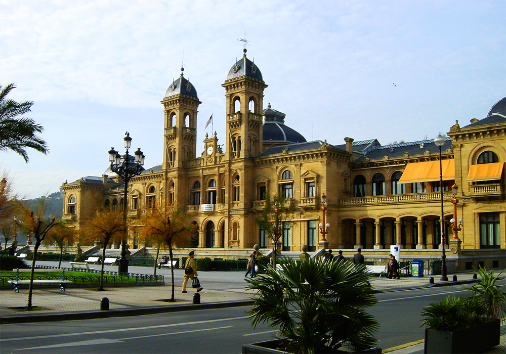 Ayuntamiento de San Sebastián (España)